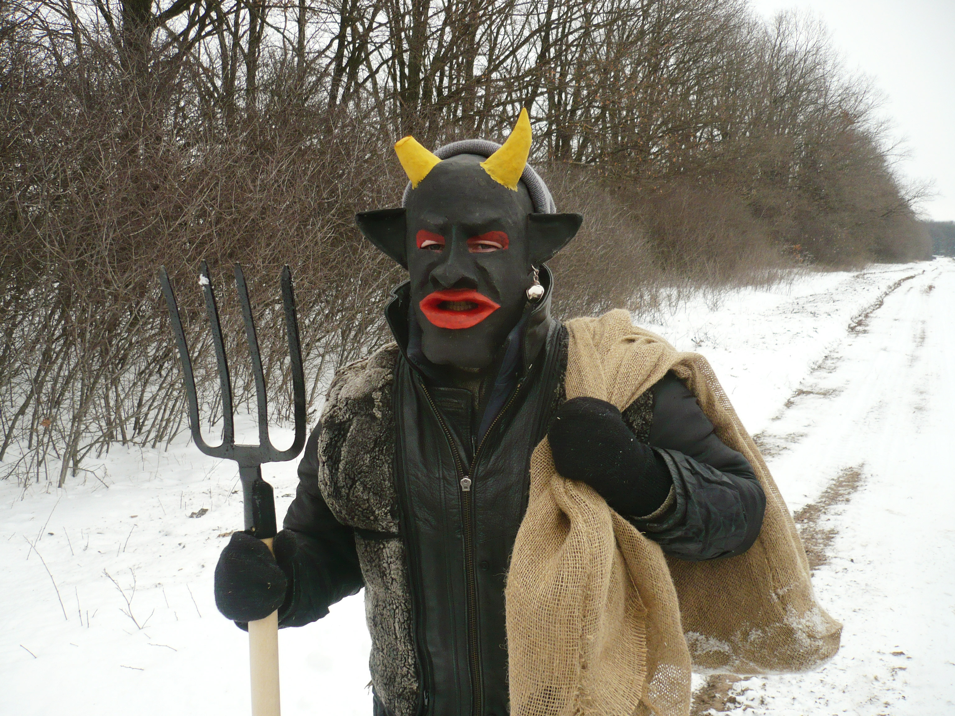 «Чёрт». Колядки в родовом экопоселениии «Кореньские родники». Белгородская область, декабрь 2012 г.